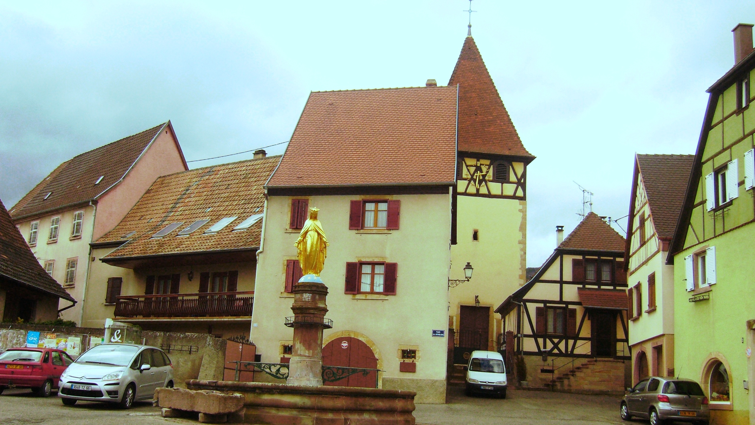 Fontaine avec statue de la Vierge à Obermorschwihr (Haut-Rhin).